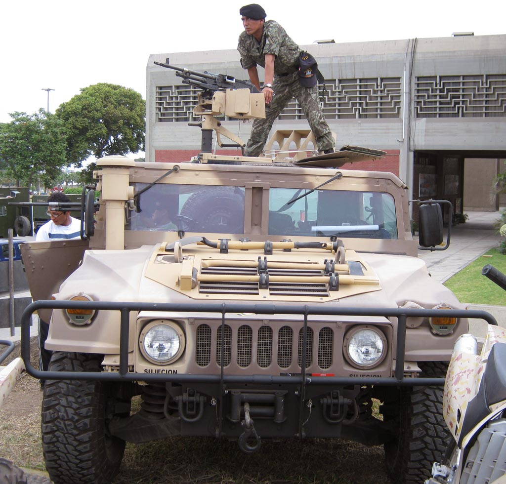 Vehículo HUMVEE en el SITDEF 2011